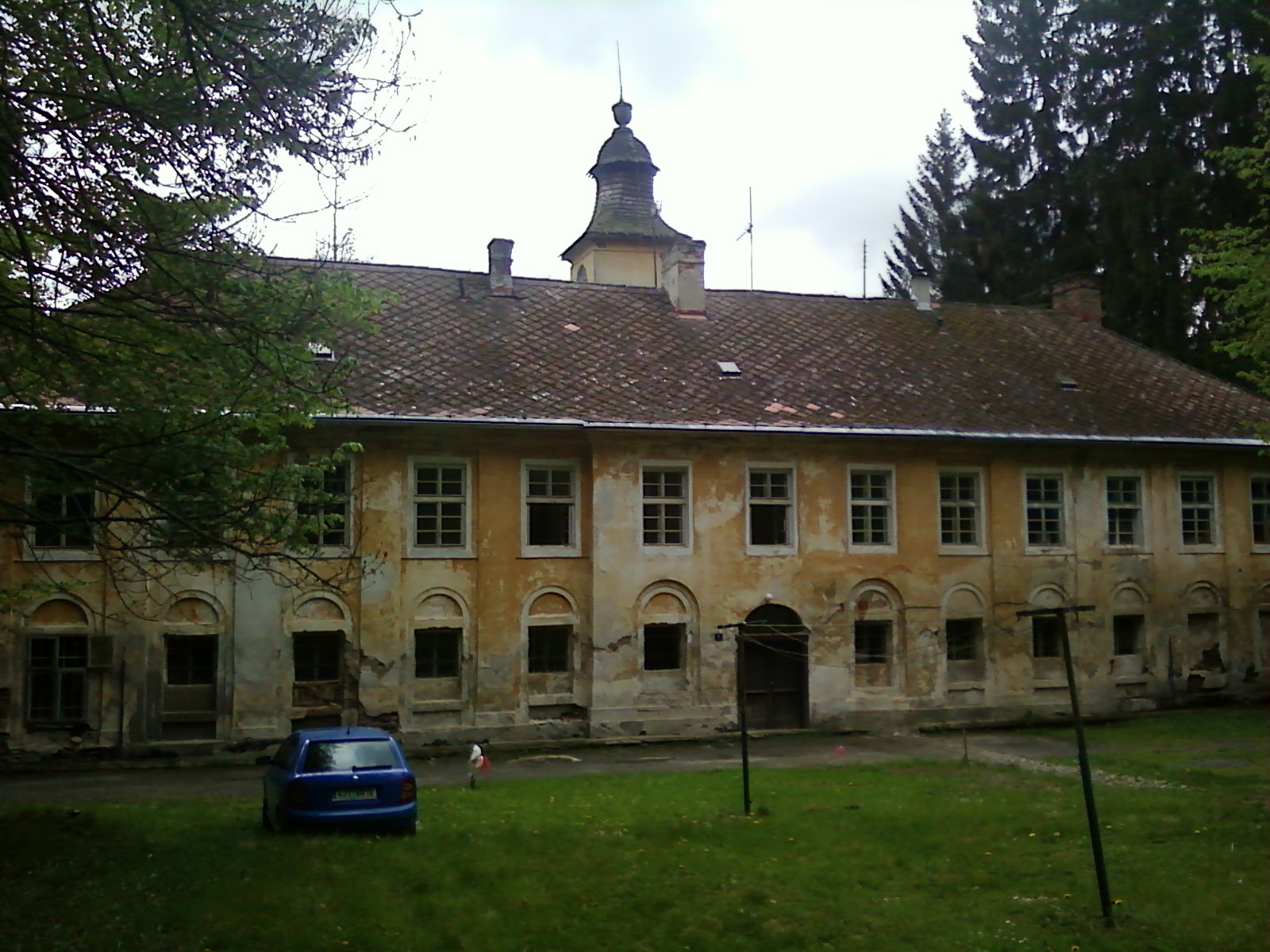 Zámek Nový Dvůr u Kamene (stav v roce 2014)